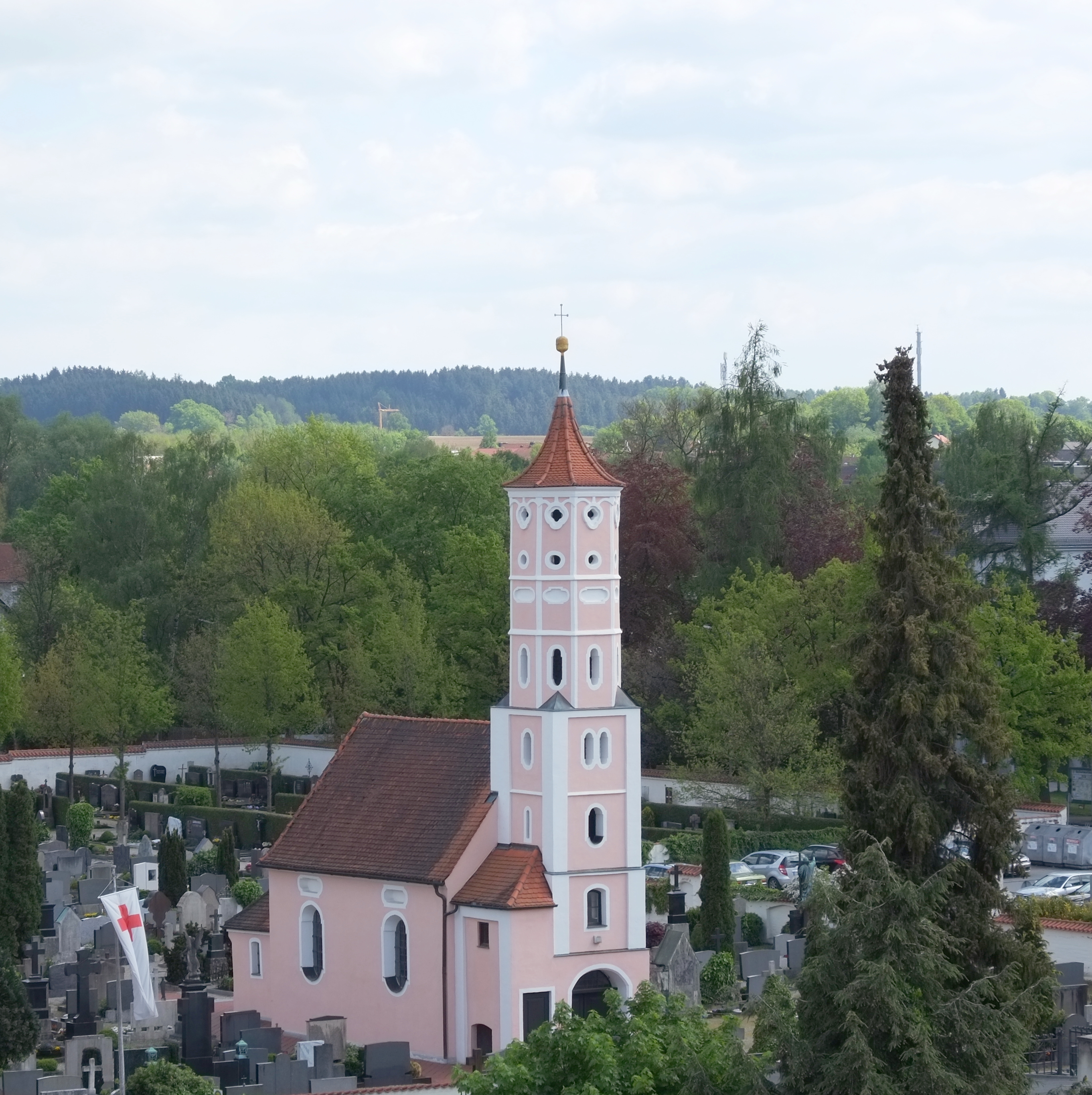 Katholische Friedhofskirche St. Michael in Aichach im Landkreis Friedberg-Aichach (Bayern, Deutschland)